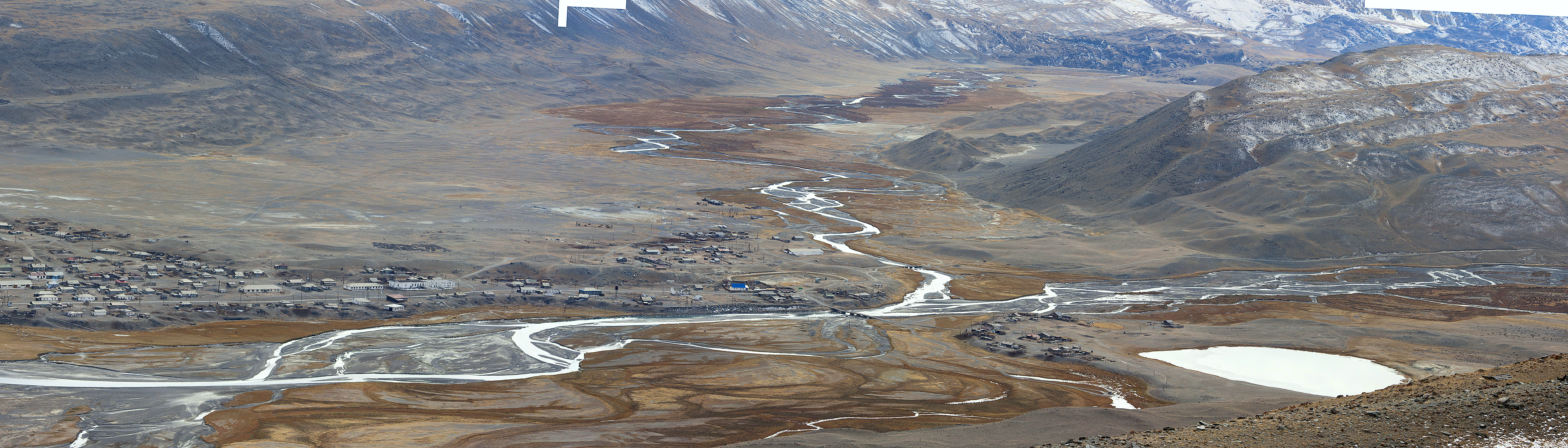 Начало реки Чаган Узун. Место слияние рек Чаган и Талдура